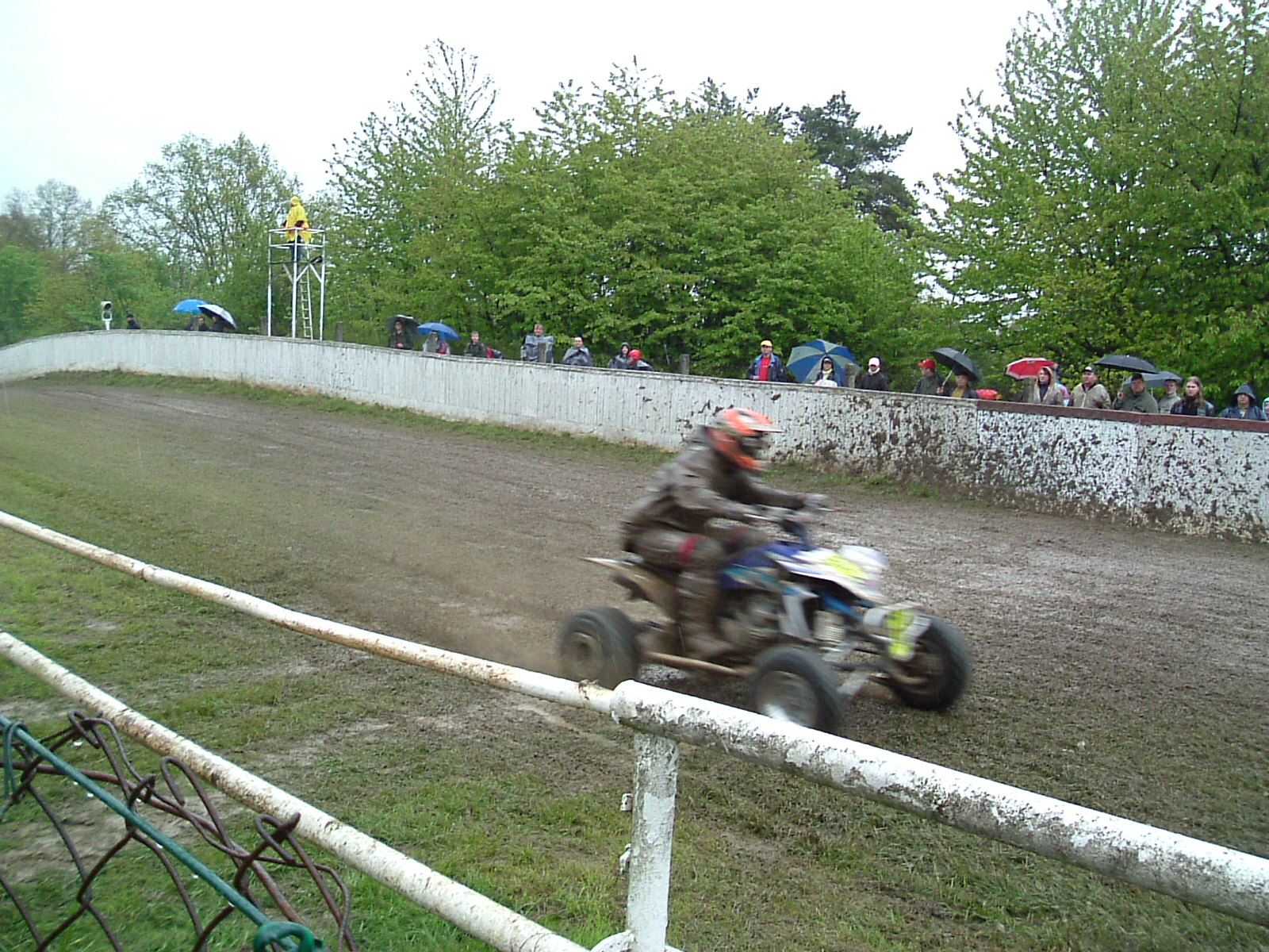 Quadfahrer auf dem nassen Bergring 2005 (Rennen wurde abgesagt)